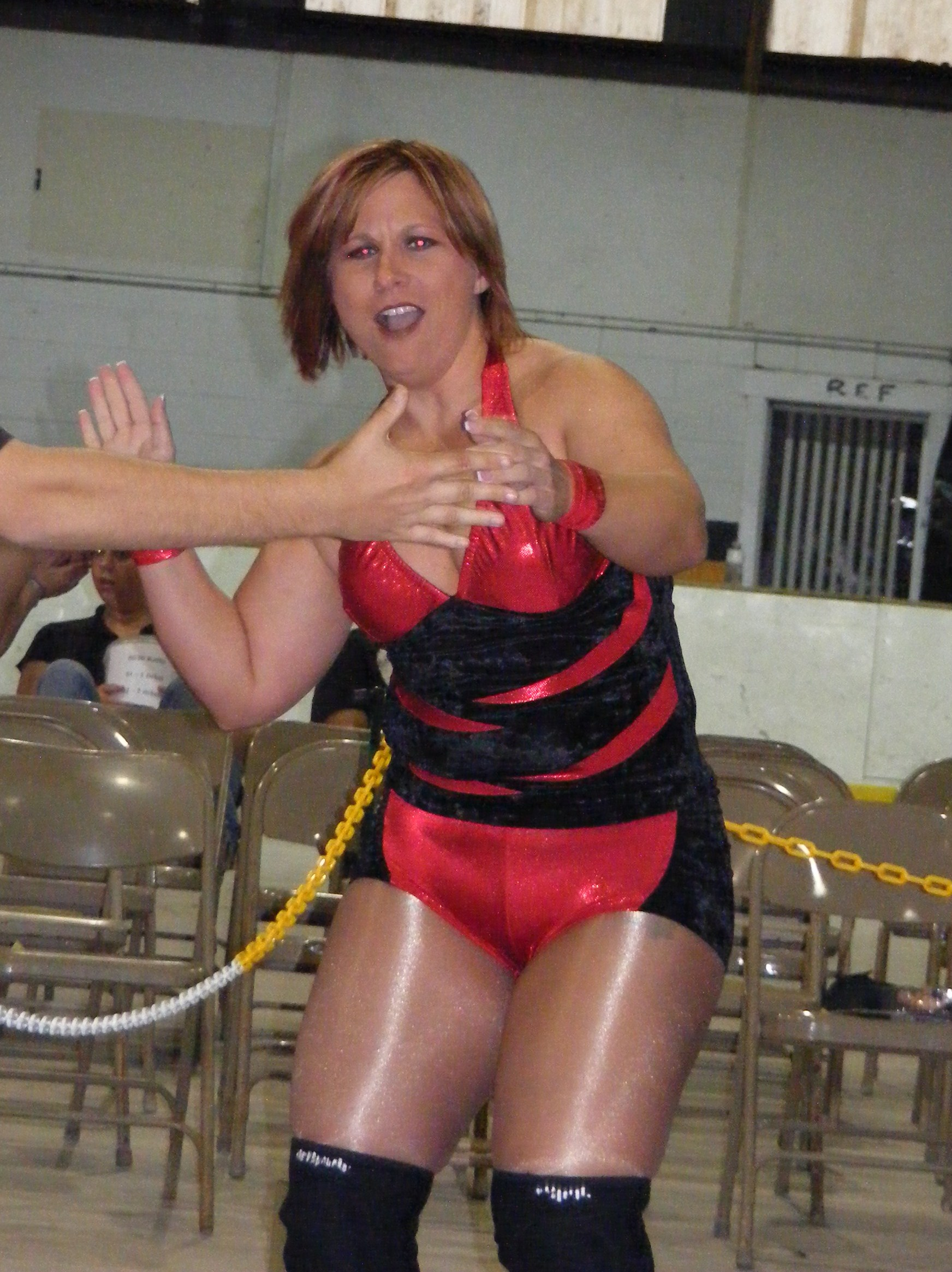 Lexie Fyfe, June 2008.